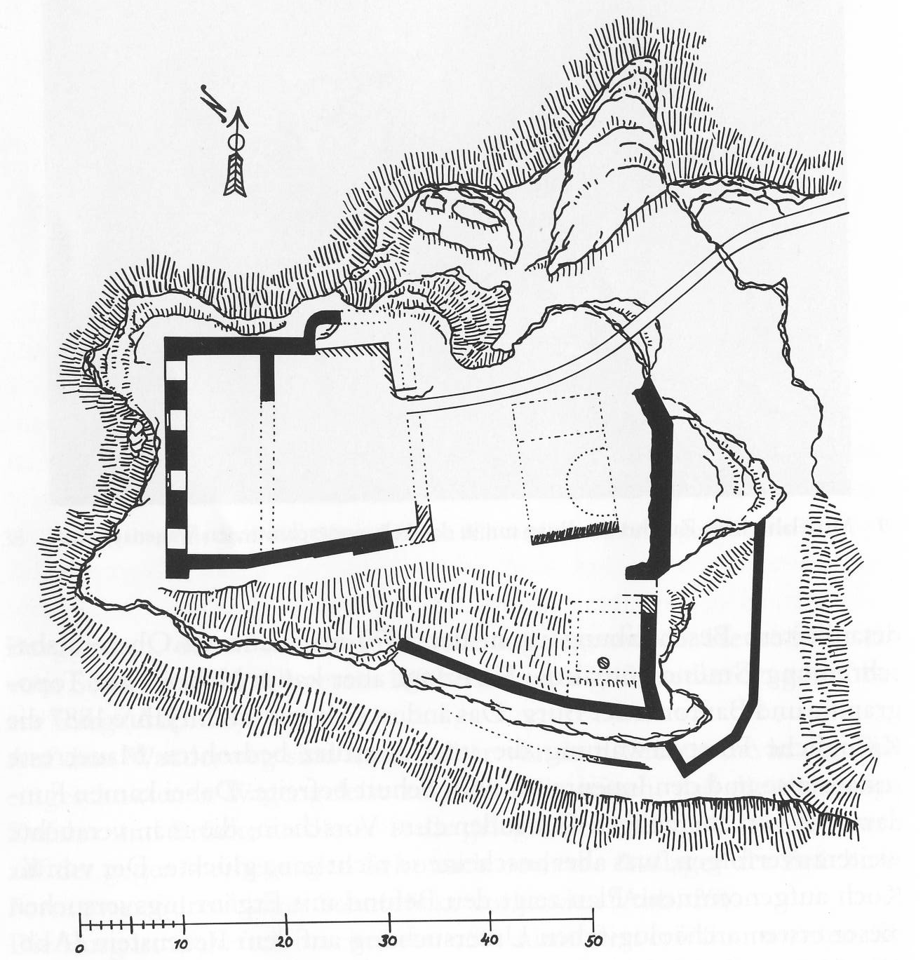 Plan der Burgruine Rosenstein von K. Koch, Aufnahme 1887 durch die königliche Forstverwaltung Württemberg